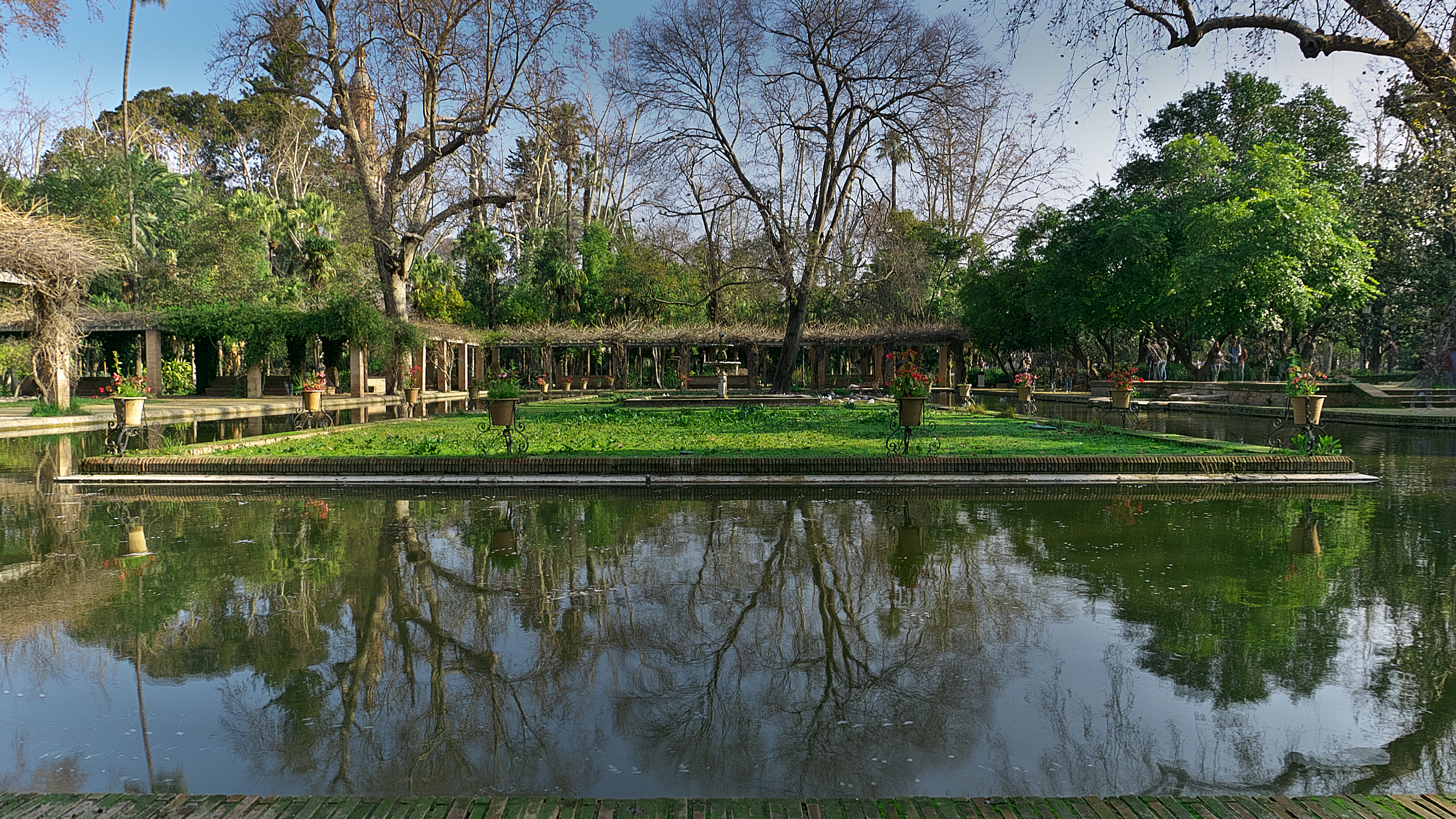 Parque de María Luisa. Vista de la Glorieta de los Lotos